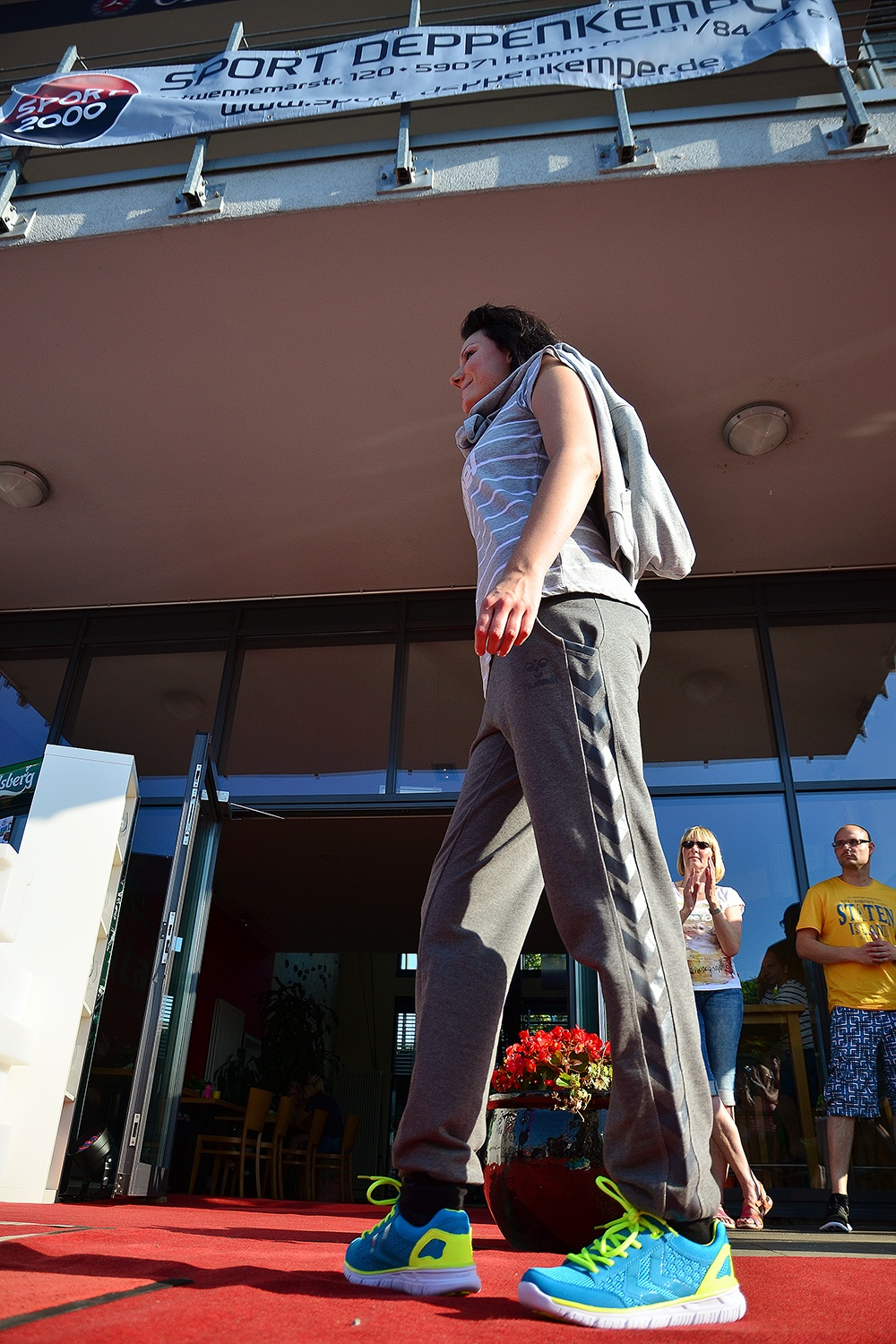 aktivita Hamm, Fitness-Club, Datum/Uhrzeit: 06.07.2013 18:51:23